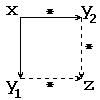 Definição de semi-confluência. Linhas sólidas representam o quantificador universal e linhas tracejadas representam o quanitificador existencial.